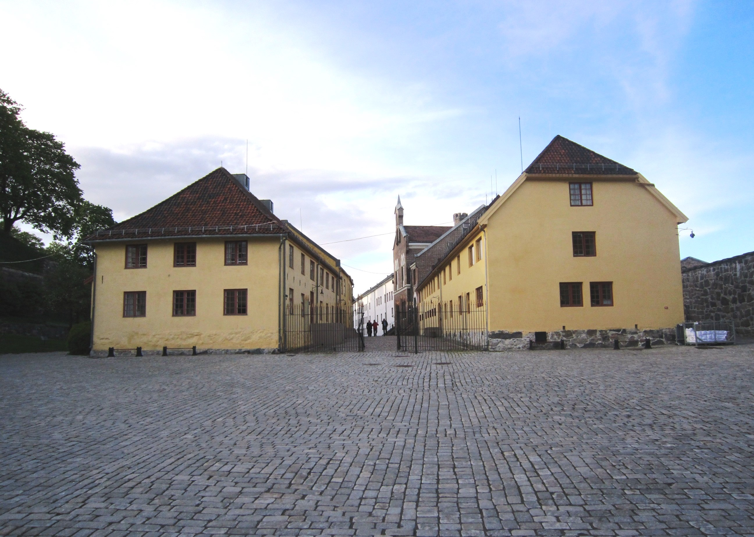 Nordover over Michael von Sundts plass på Akershus